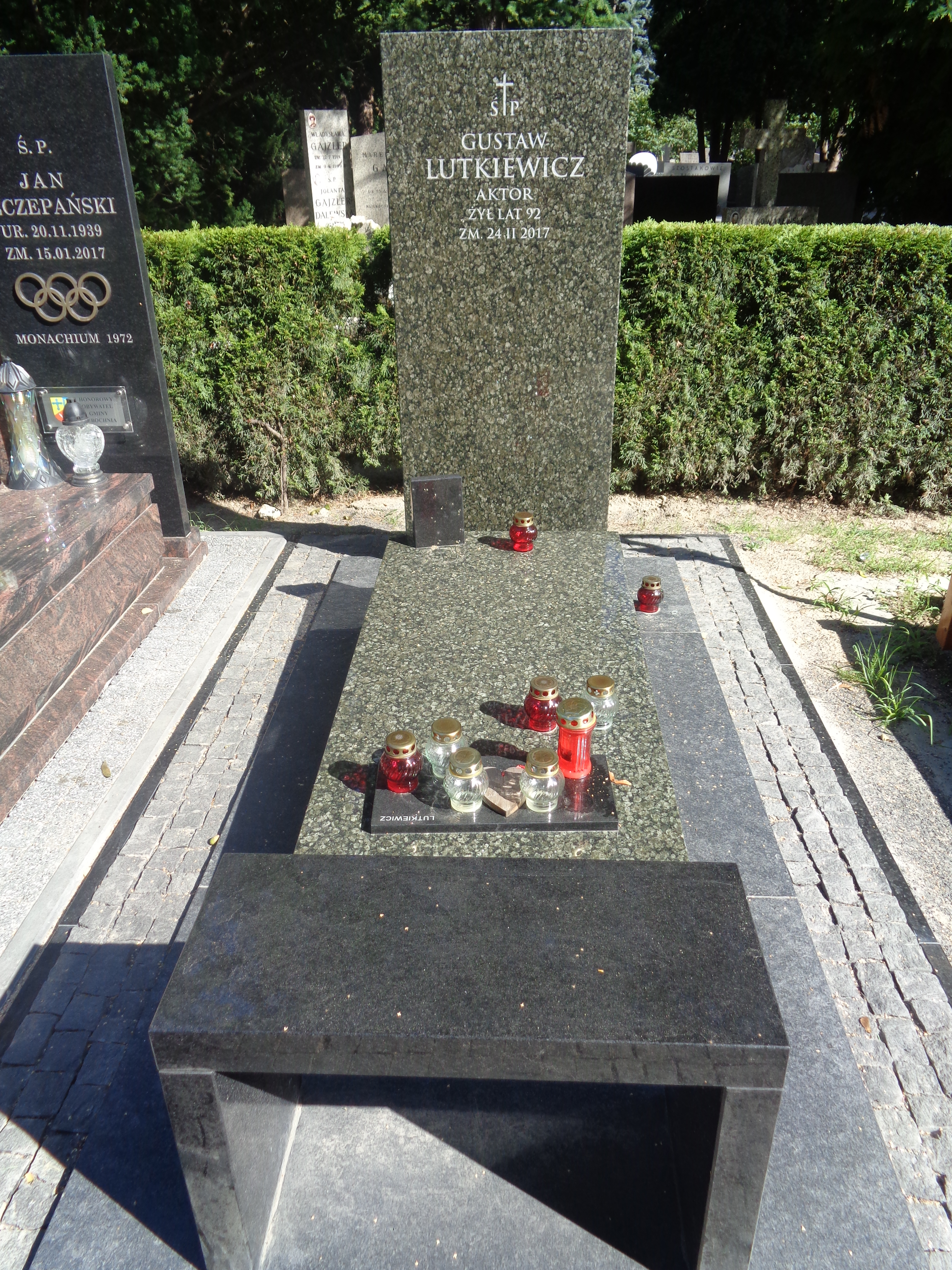 Grób Gustawa Lutkiewicza na cmentarzu wojskowym na Powązkach